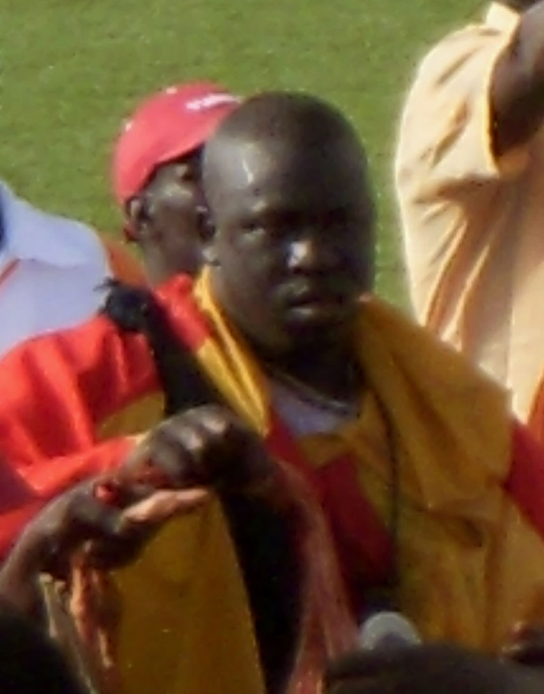 Yekini, un champion de lutte sénégalaise au Stade Demba Diop de Dakar, Sénégal